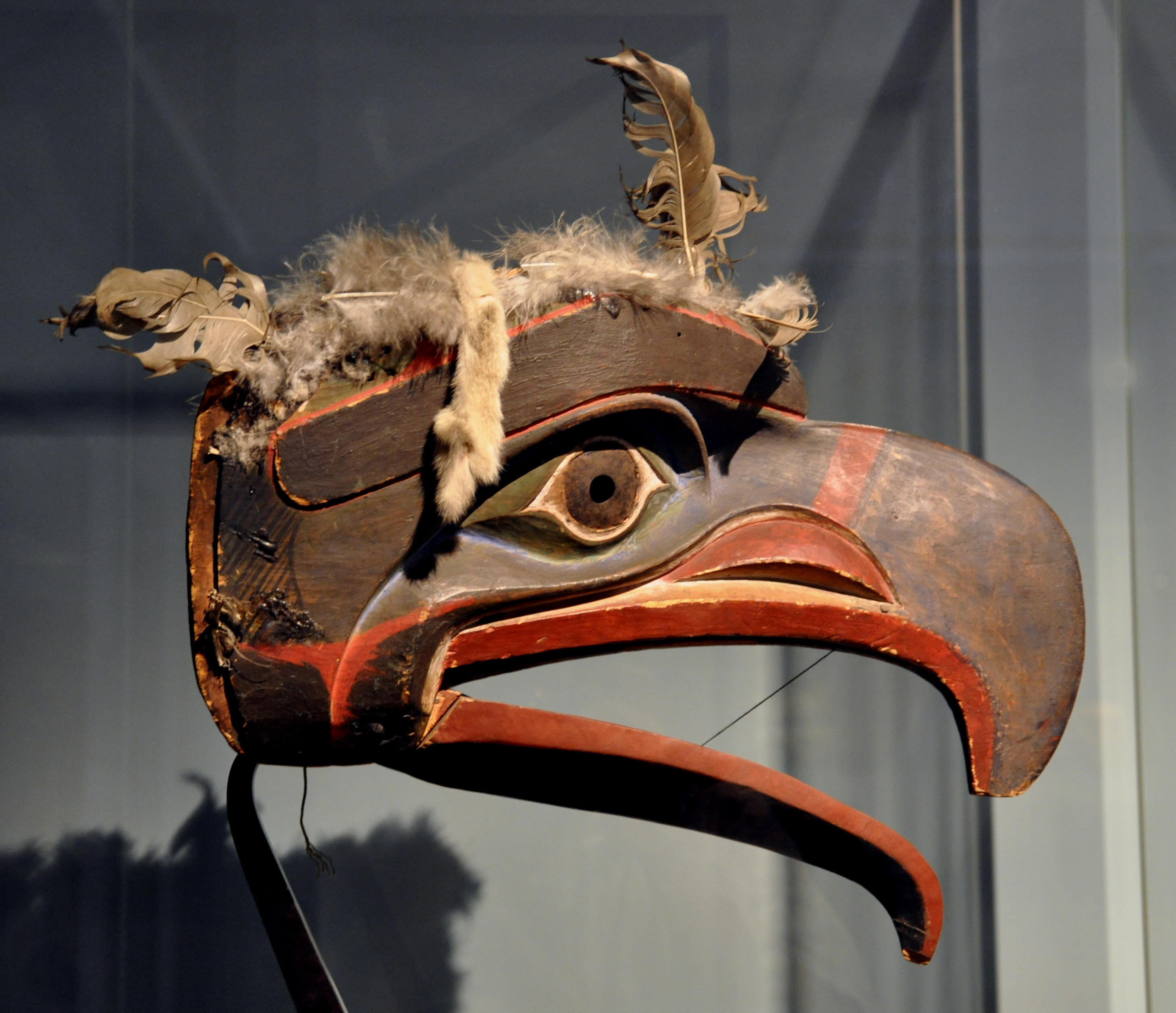 Adlermaske, Kanada (Bellabella, Tlingit oder Kwakiutl), 1. Hälfte 19. Jh.; Holz, Eisen, Schnurfasern, Hermelinpelz Museum Rietberg, Zürich; Geschenk Hans Vontobel durch Vermittlung von Regula Brunner, Inv. Nr. 2007.4